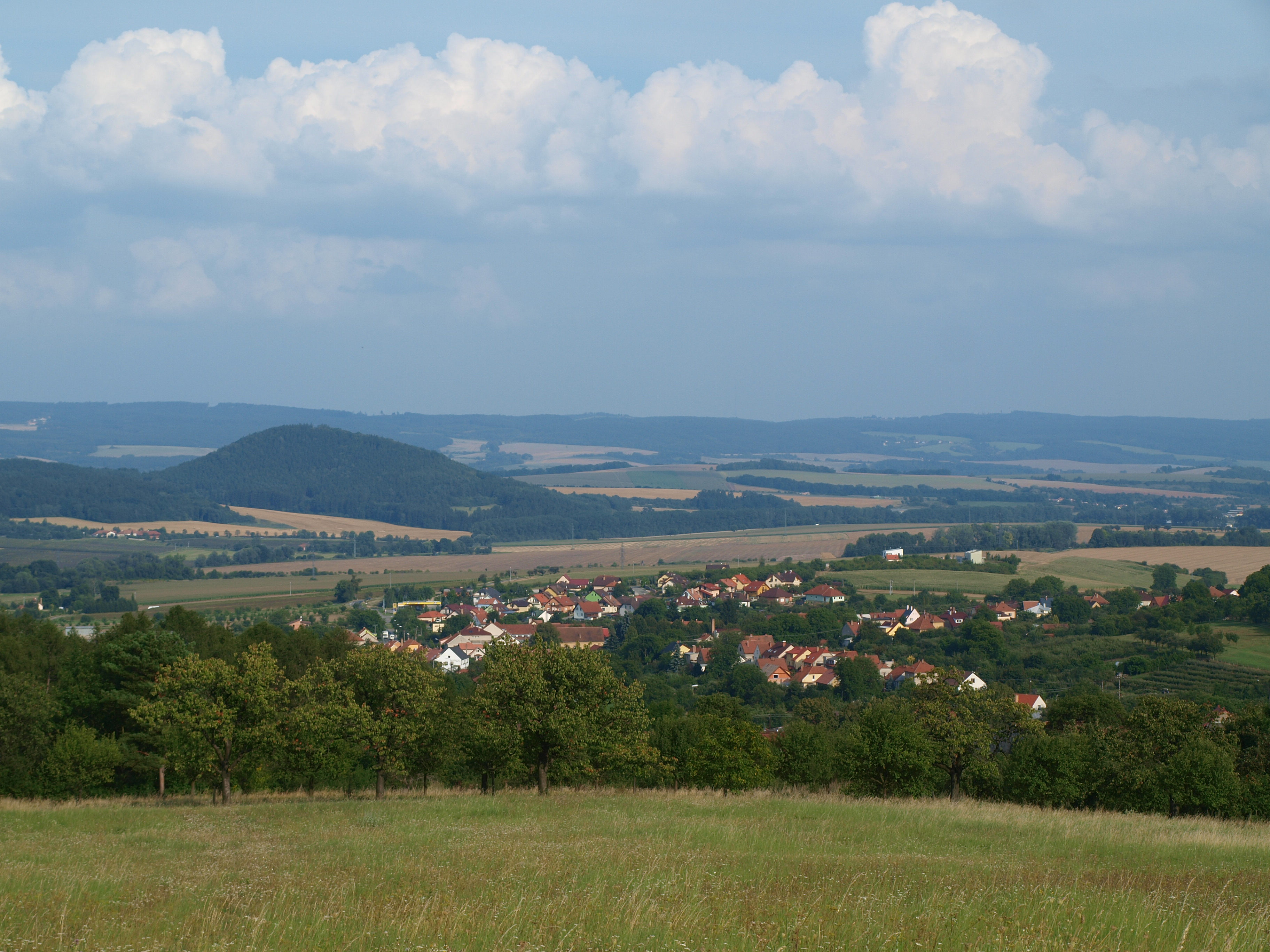 Pohled na Lysice od západu